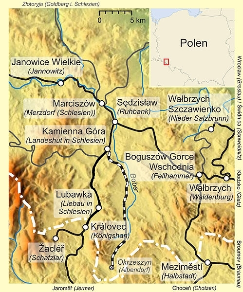 Położenie linii kolejowej Kamienna Góra - Okrzeszyn